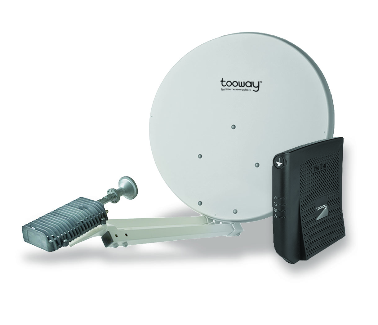 Antenna satellitare tooway per la ricezione della connessione a banda larga tramite il satellite KA-SAT